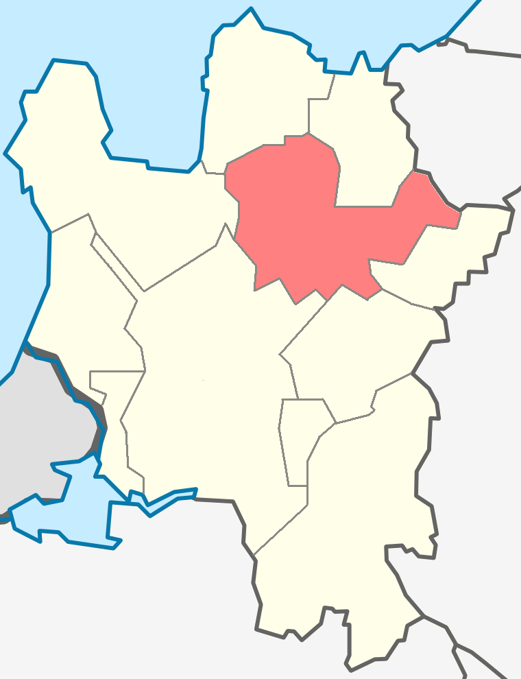 Котельское сельское поселение на карте Кингисеппского района